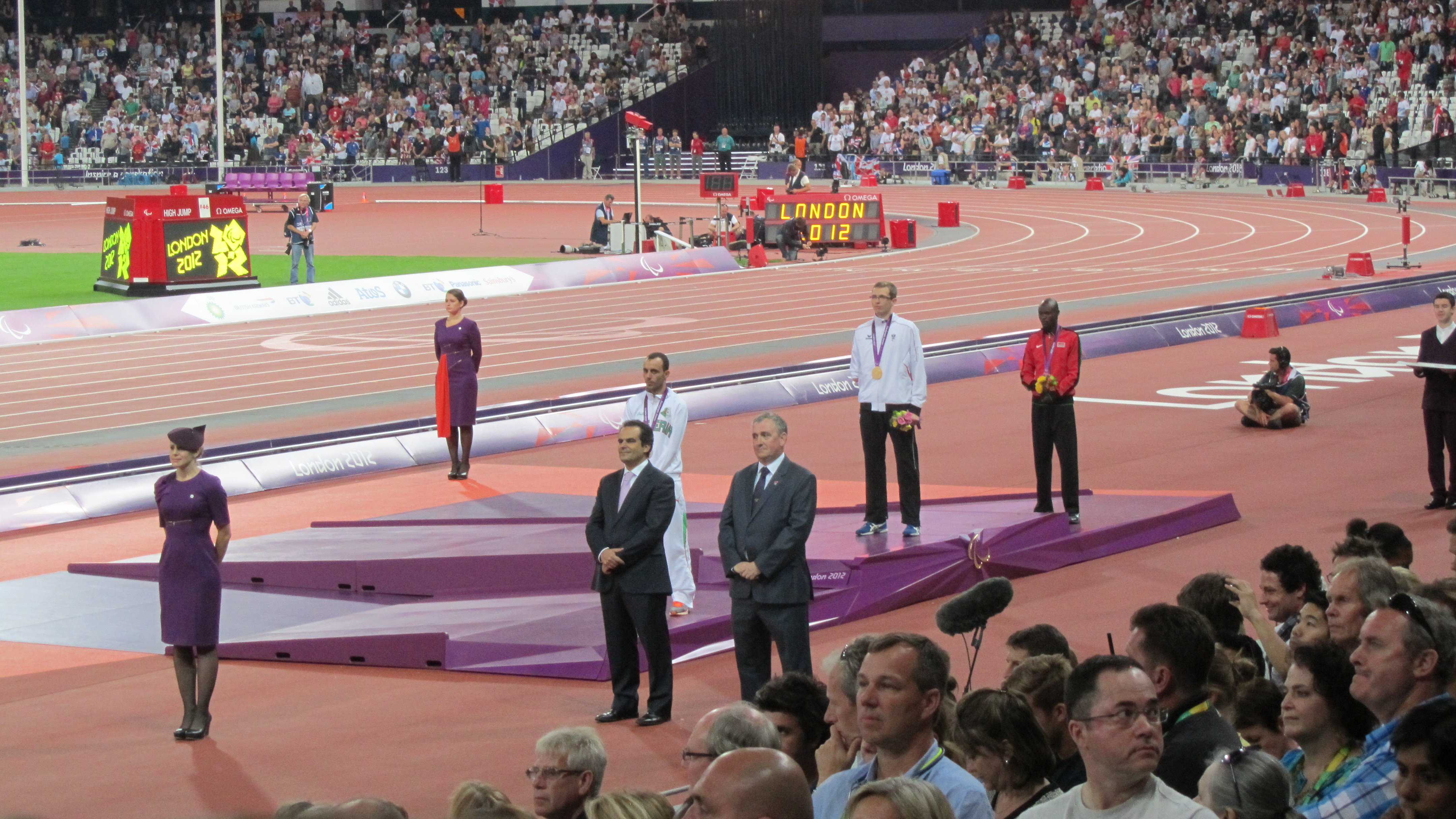 Gold: Gunther Matzinger (Austria); Silver: Samir Nouioua (Nigeria); Bronze: Abraham Tarbei (Kenya)